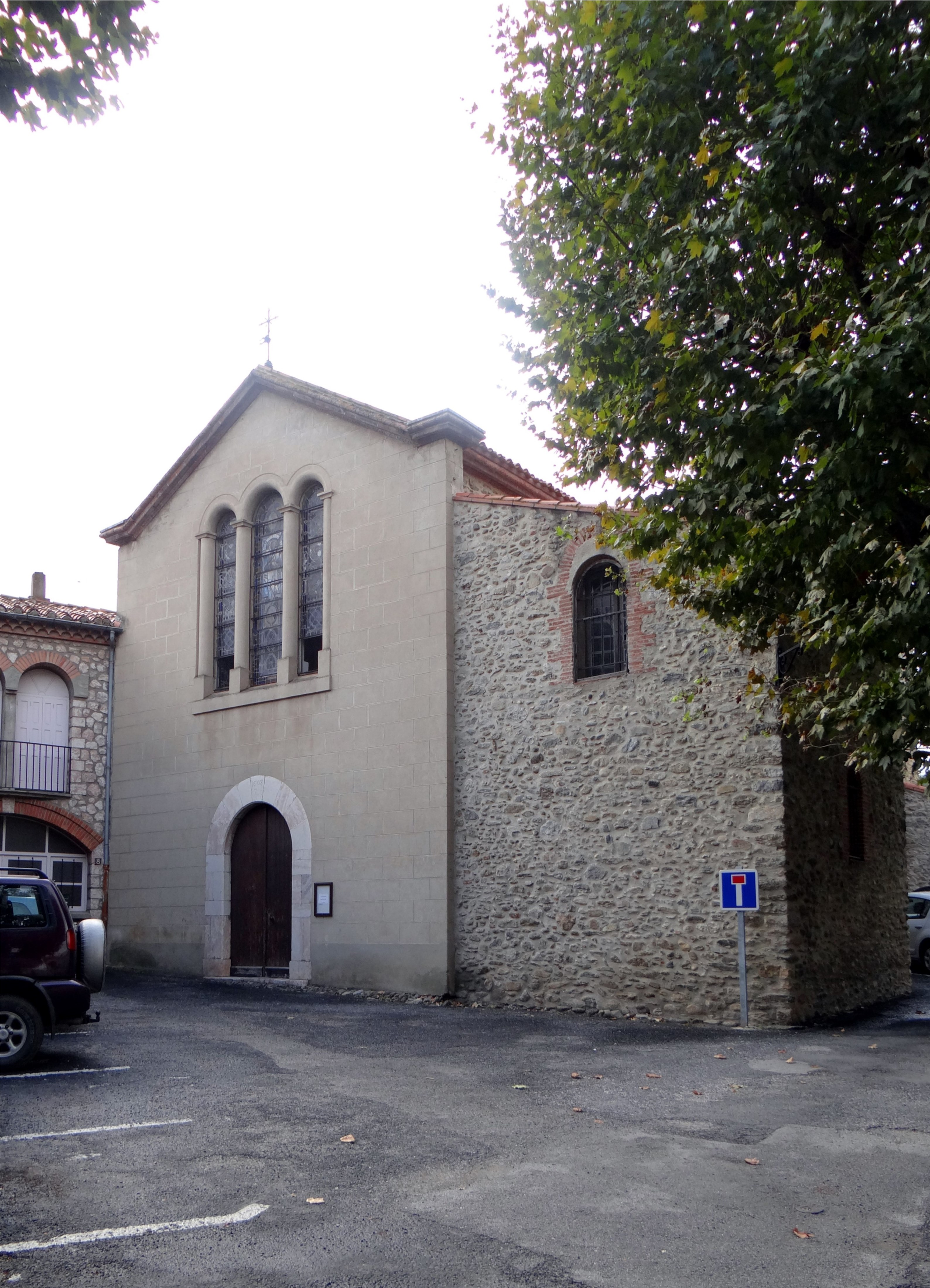 Église Saint-Félix de Codalet, Pyrénées-Orientales, France